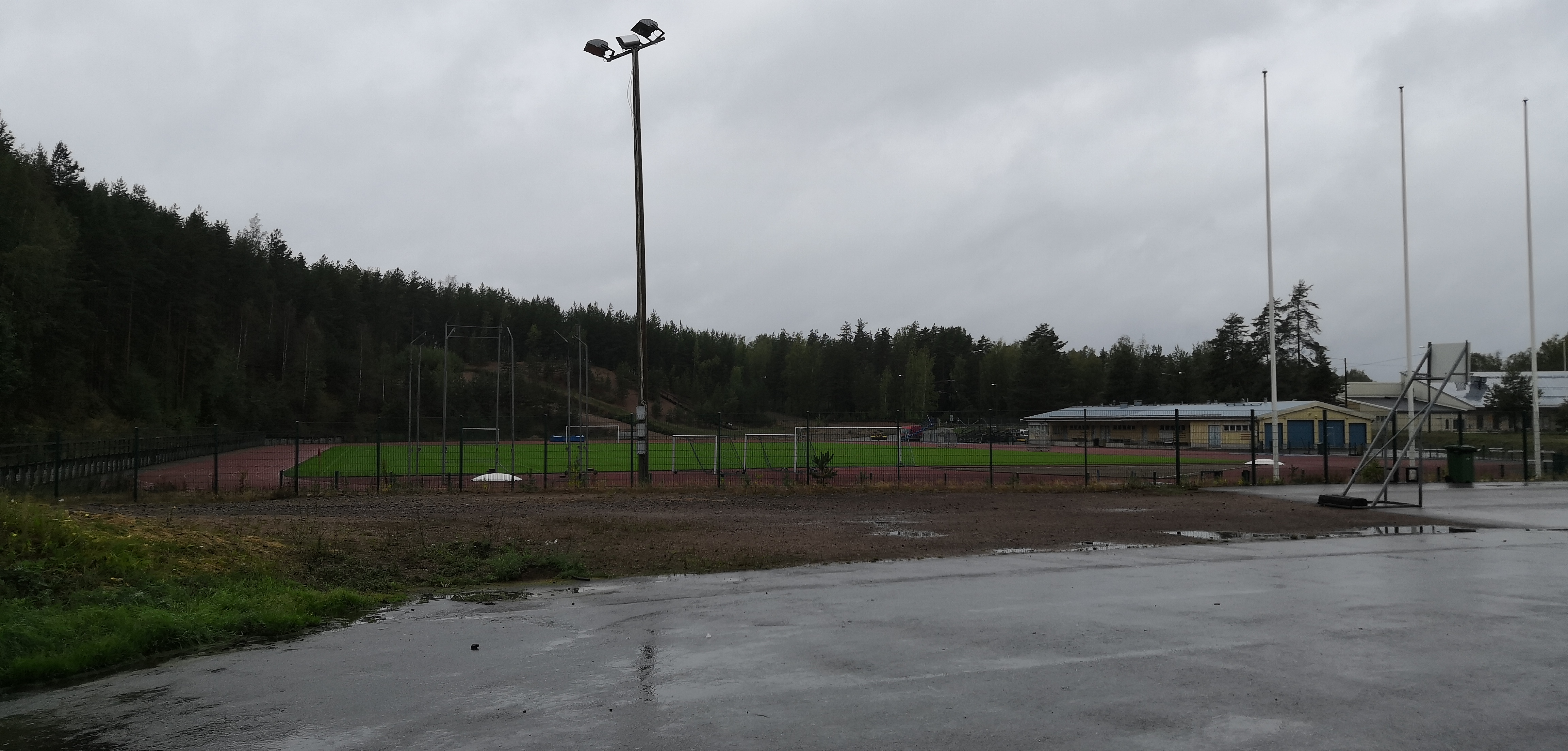 Valkealan urheilukenttä